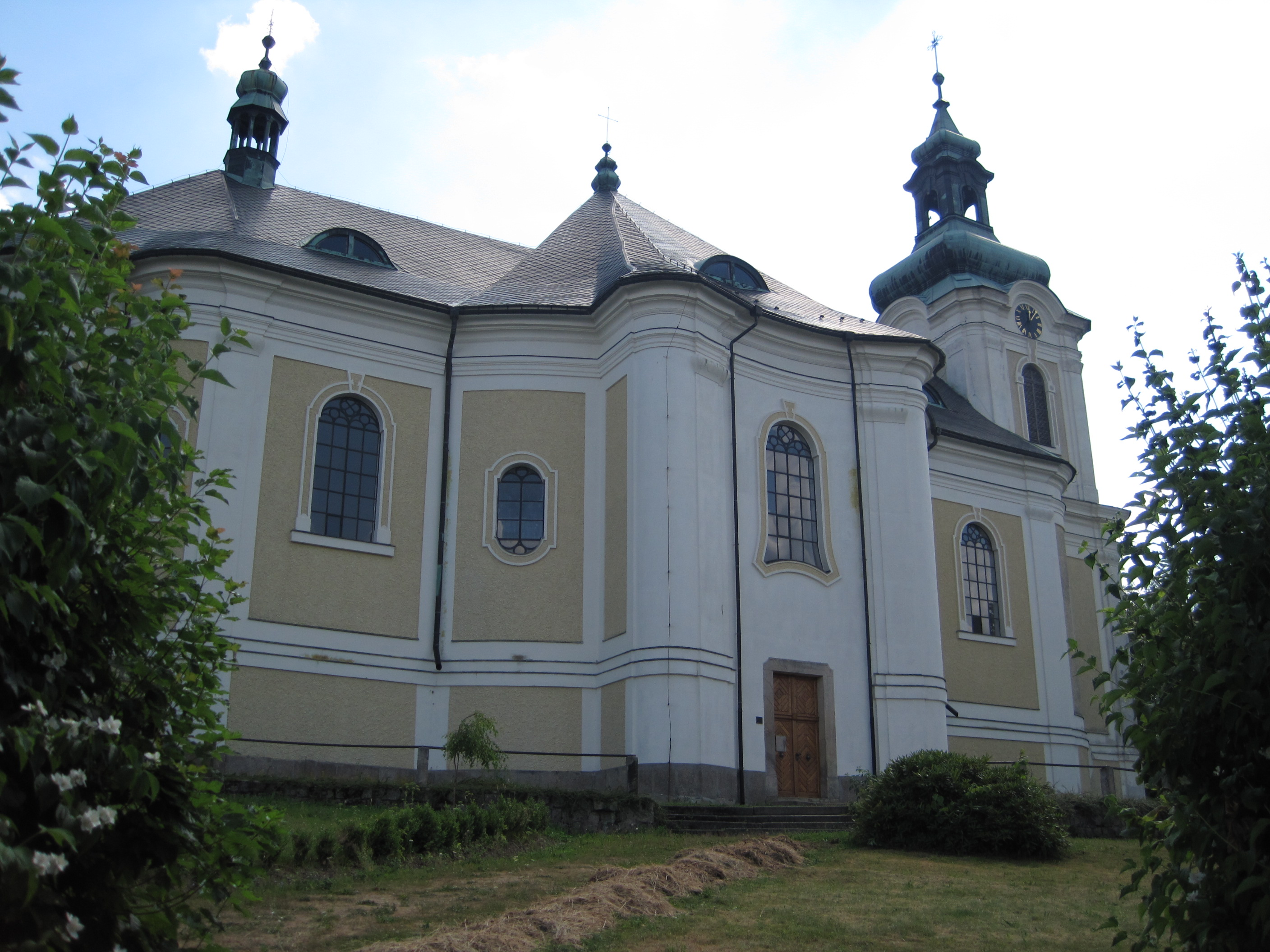 Kostel Archanděla Michaela, Smržovka.